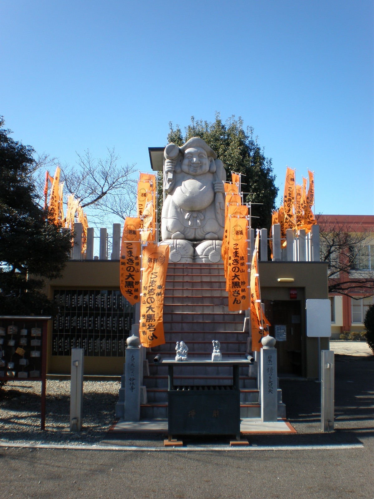 愛知県小牧市の妙林寺にある"鐘つき大黒天"